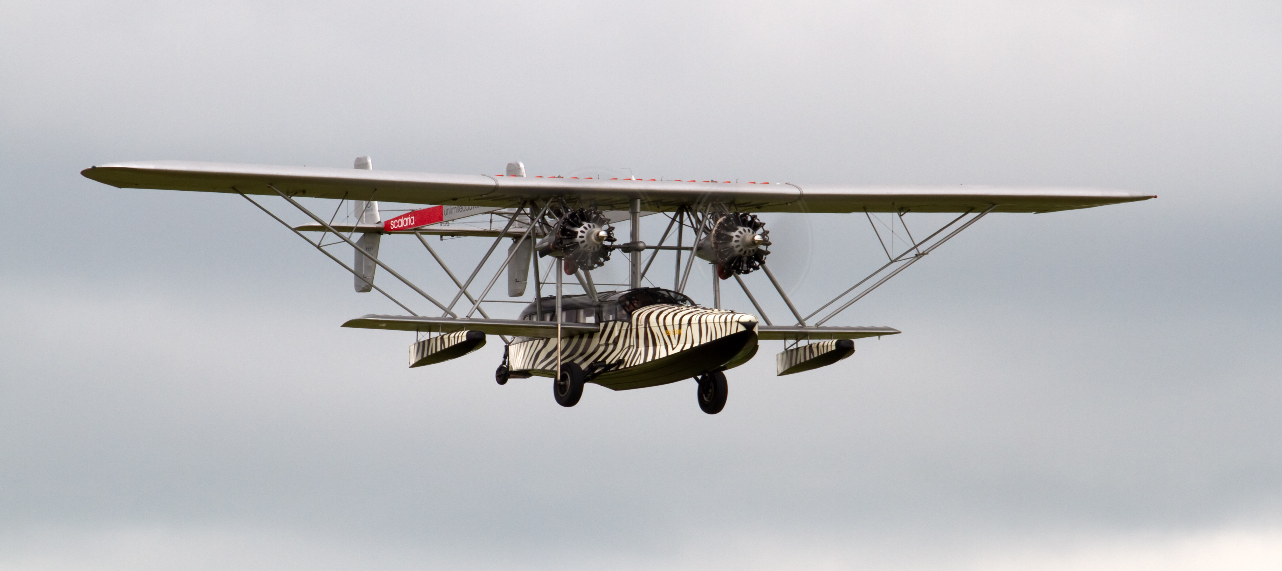 Duxford 2012